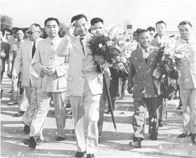 1956年，周恩来等人在北京机场。欢迎老挝王国万象当局内阁首相梳发那·富马亲王为首的老挝代表团访问中国。